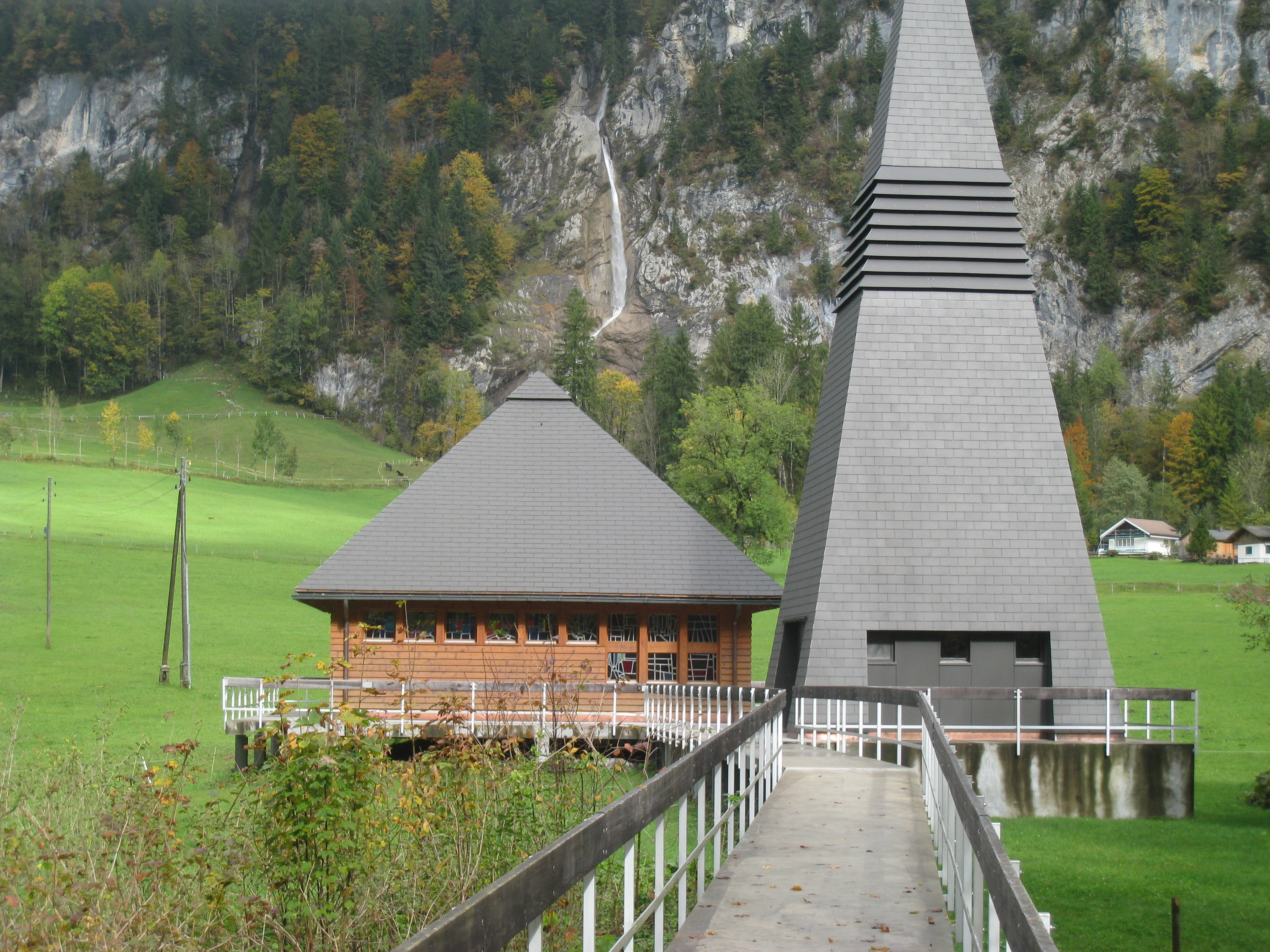 Bergkirche Klöntal, Kanton Glarus, Schweiz